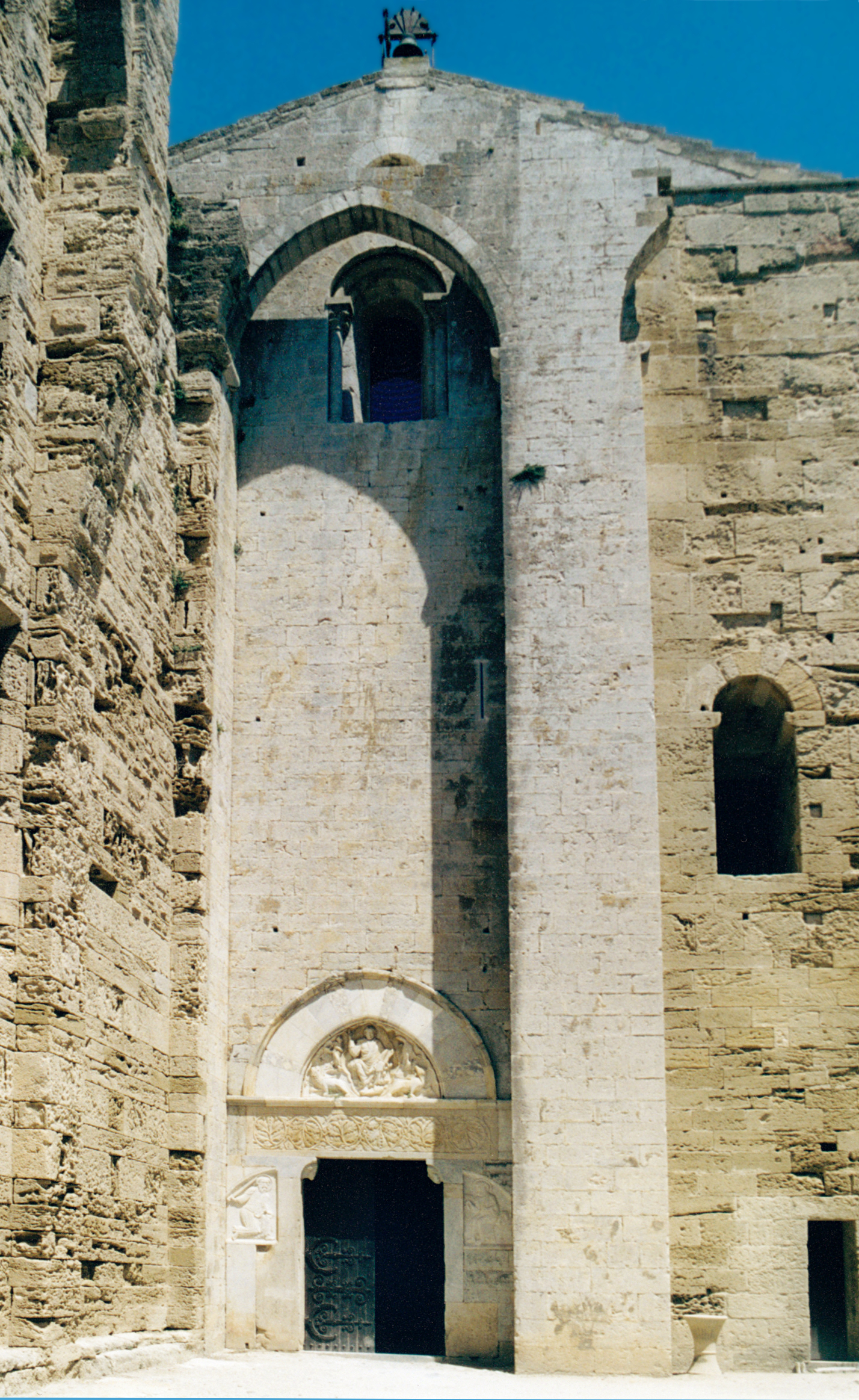 France - Languedoc - Hérault - Cathédrale Saint-Pierre-et-Saint-Paul de Maguelone